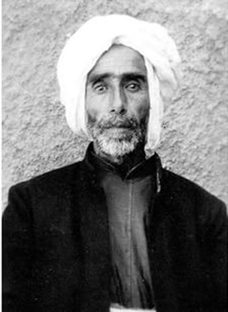 حاجی بابه شیخ سیادت - نخست وزیر جمهوری مهاباد - عکس بوکان